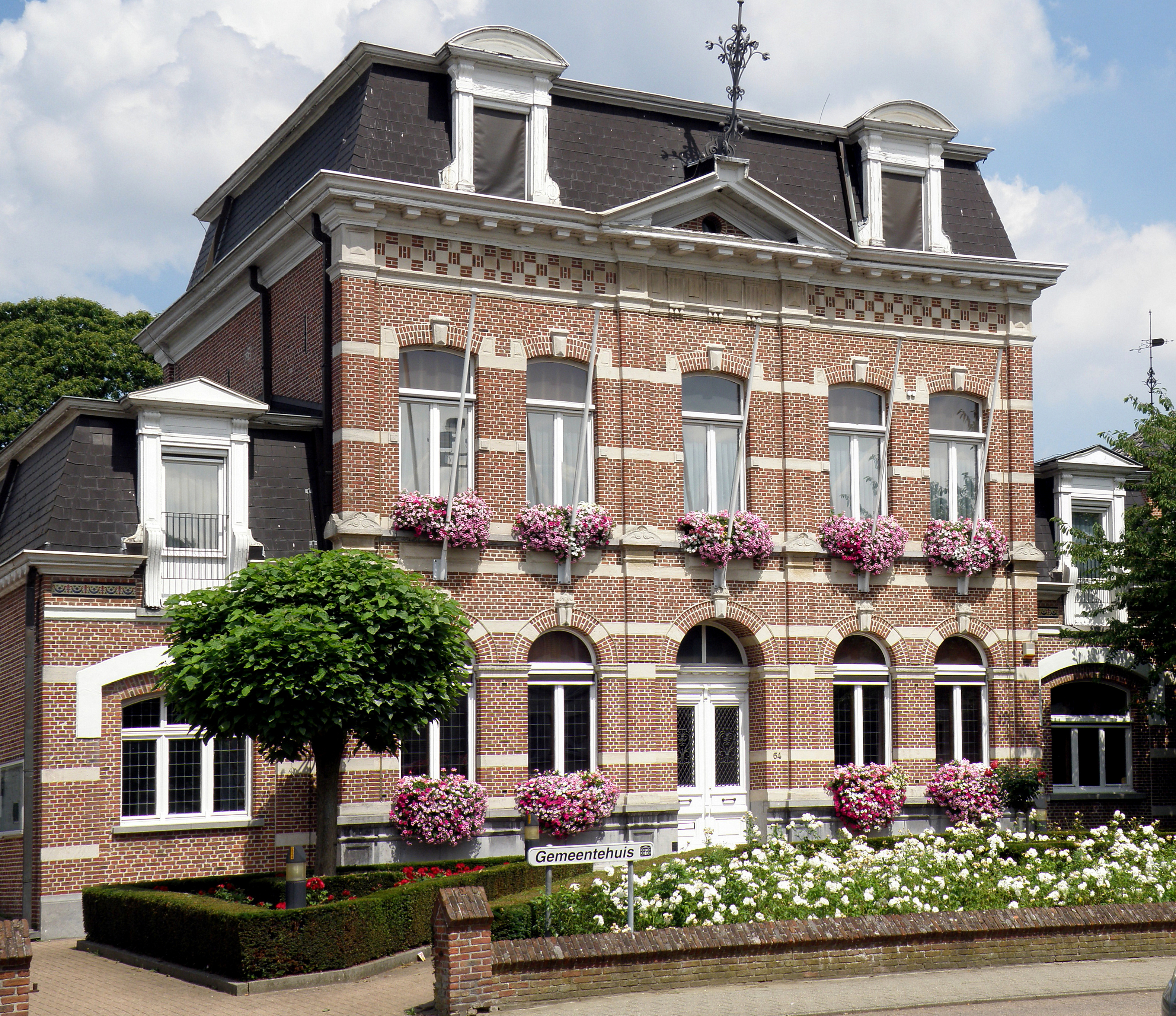 Borsbeek (prov. Antwerpen, België). Gemeentehuis, De Robianostraat nr. 64.